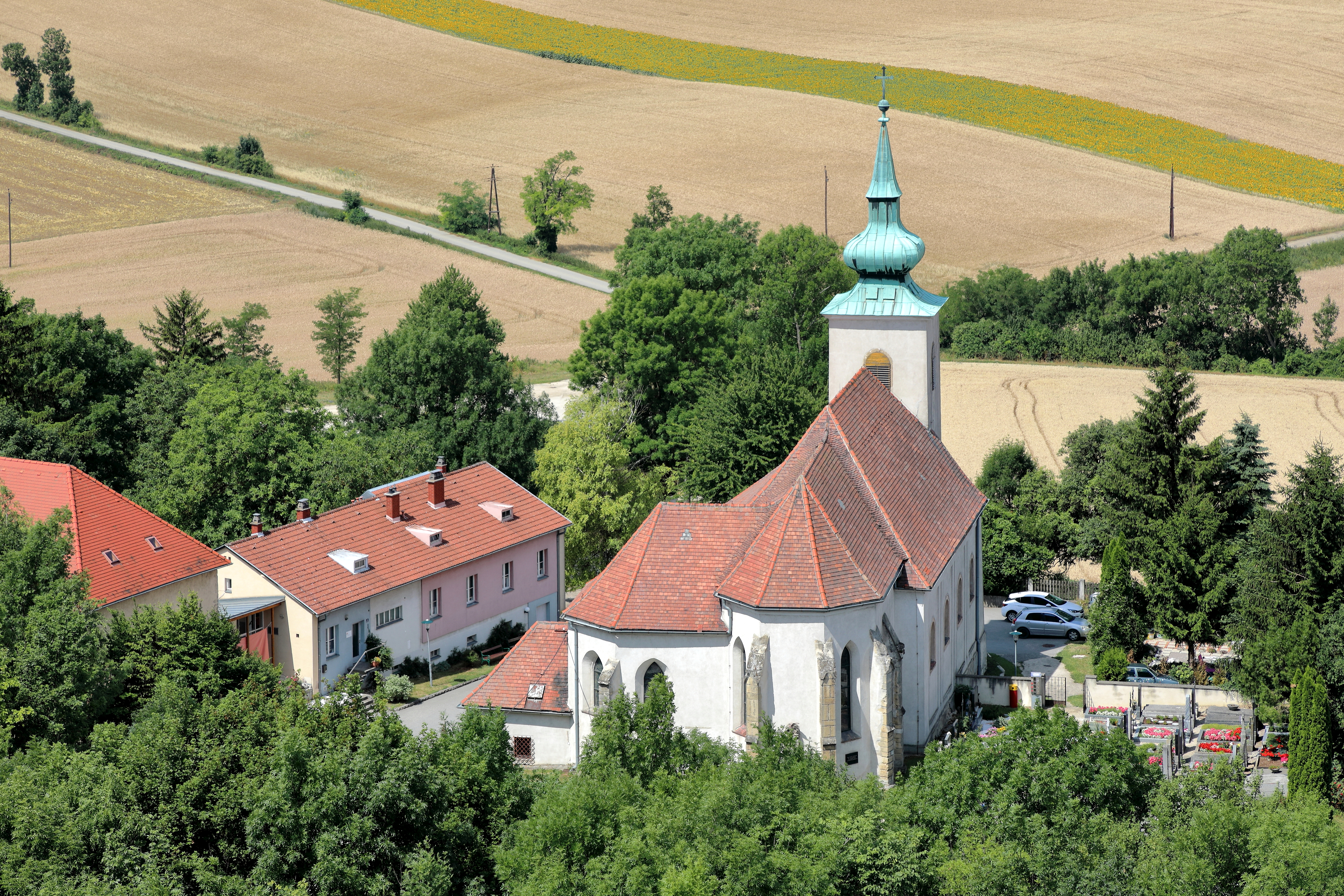 Der Kirchenweiler Oberleis mit der röm.-kath. Wallfahrts- und Pfarrkirche hll. Mauritius und Maria am Abhang des Oberleiser Berges in der niederösterreichischen Marktgemeinde Ernstbrunn.Die Kirche ist im Kern ein romanischer Saalbau. Zur Zeit der Gotik wurde die romanische Apsis durch ein Presbyterium (einjochiger Chor mit 5/8-Schluss) ersetzt und das Langhaus um ein südliches Seitenschiff erweitert. Der Turm wurde 1807 errichtet, nachdem der Vorgängerturm 1806 einstürzte.